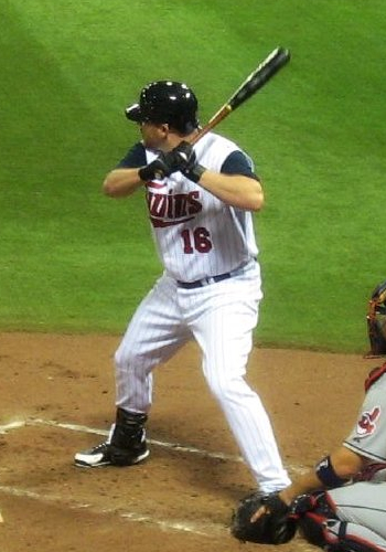 Jason Kubel on August 3, 2008